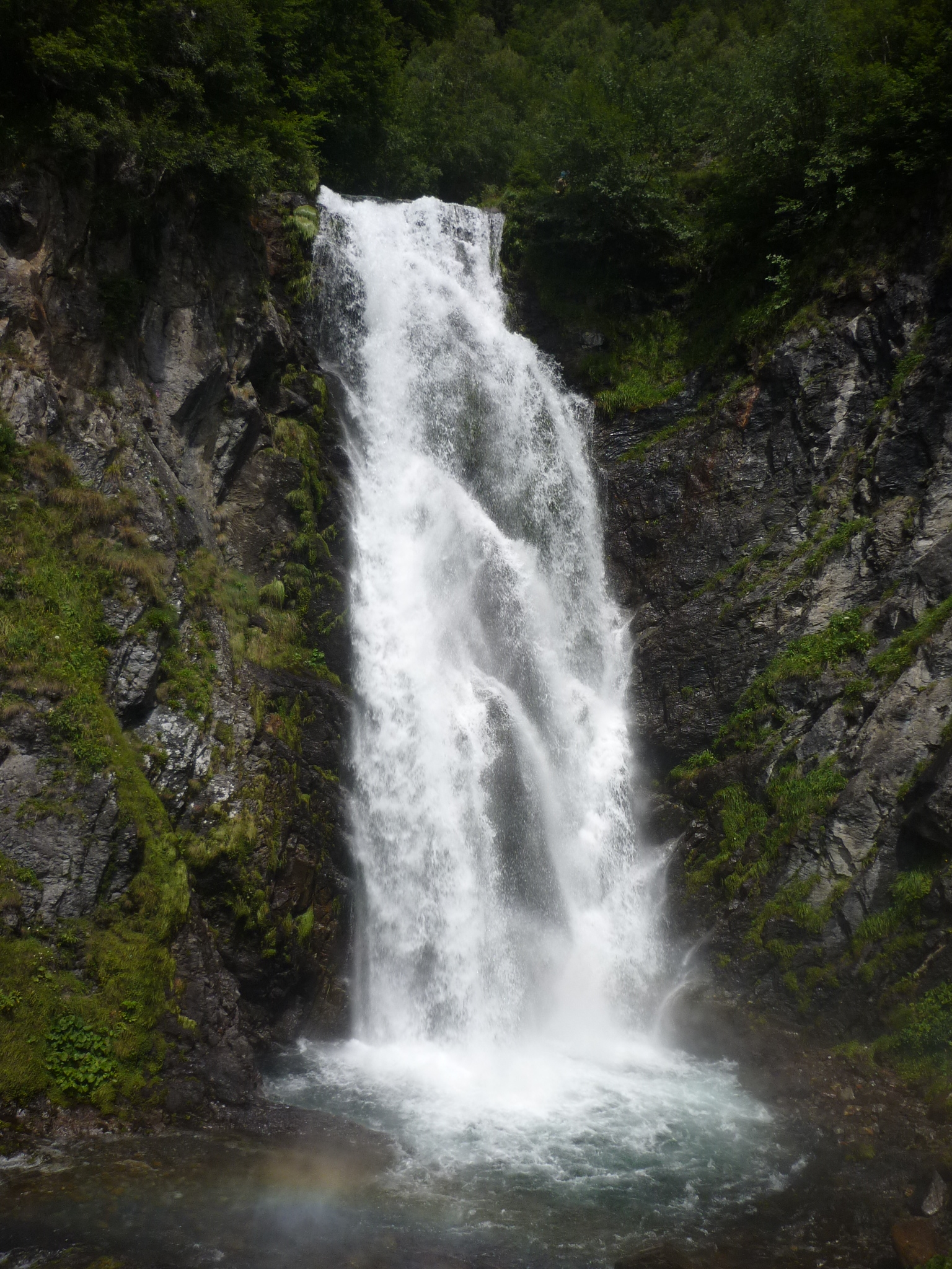 Salt del Pix, A la Vall de Varradòs (Val d'Aran) This is a a photo of a natural area in Catalonia, Spain, with id: ES510169